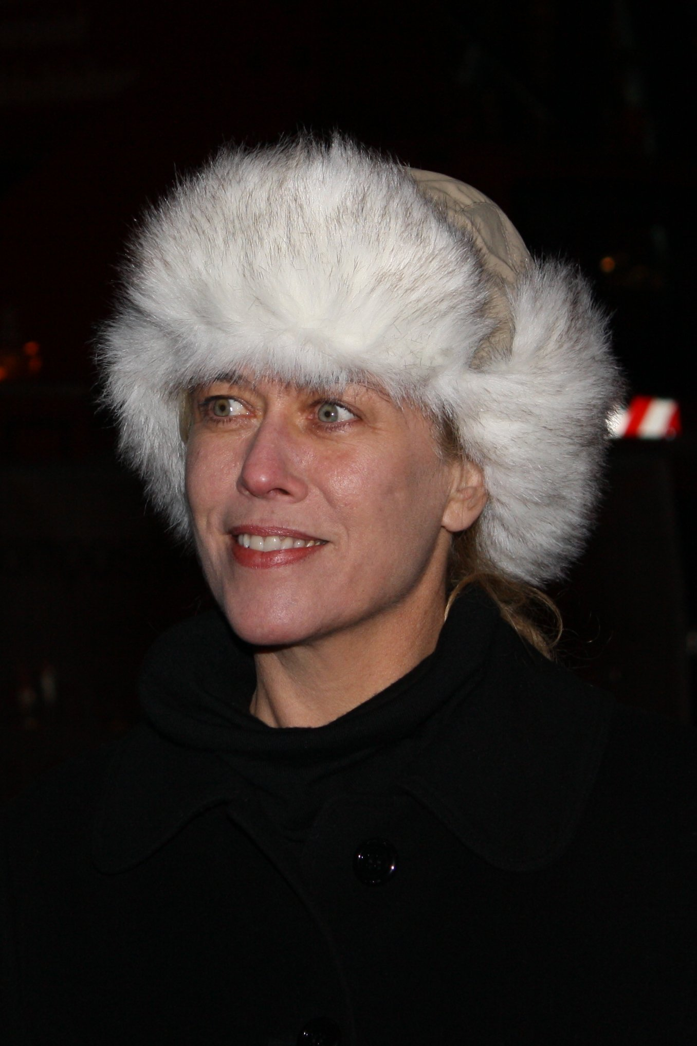 Rita McBride bei der Errichtung der Skulptur Mae West